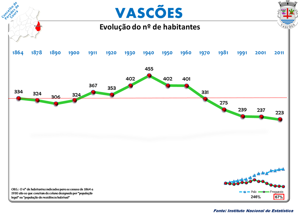 Censos 1864/2011